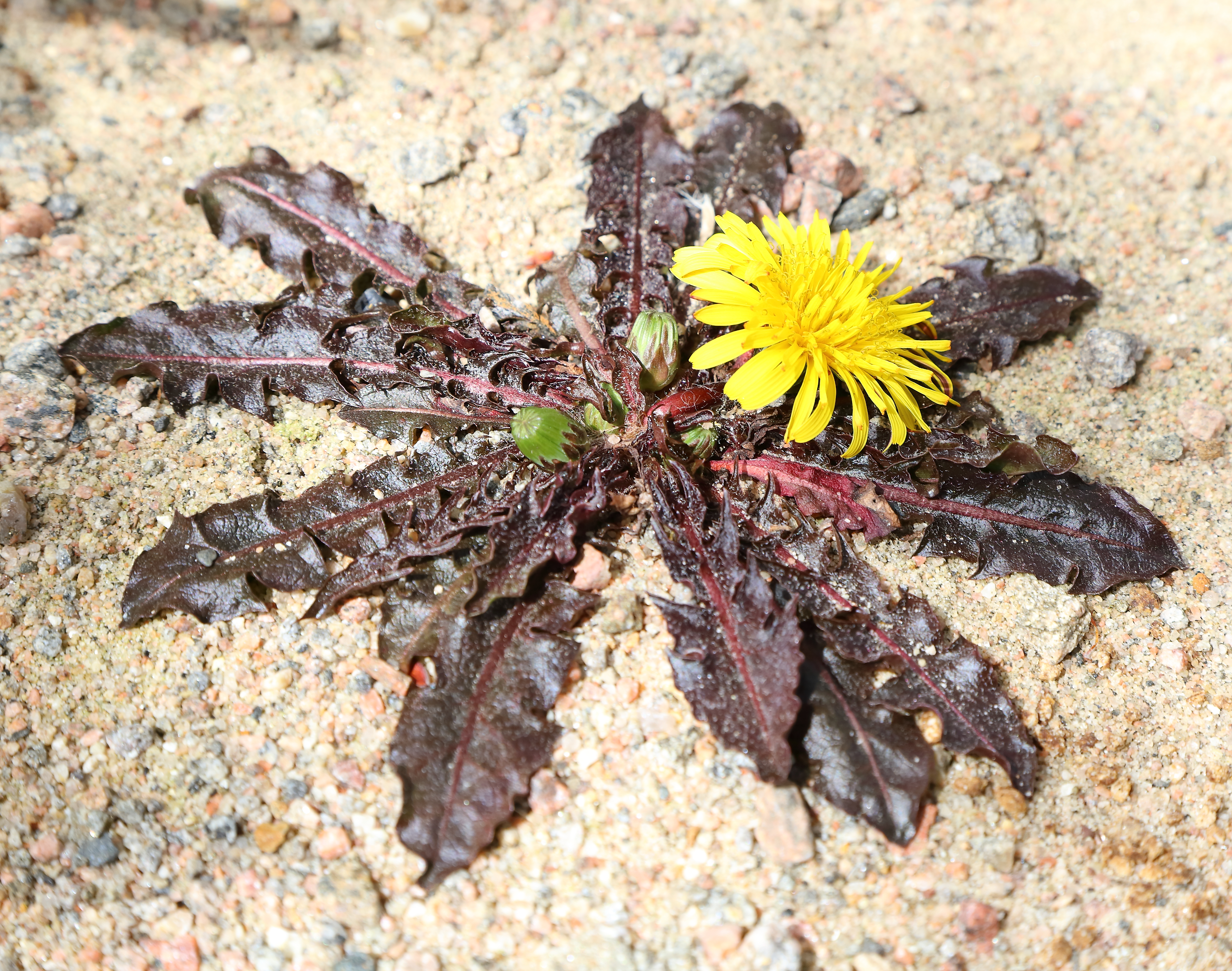 Taraxacum rubifolium identifierad med hjälp av skylt i Göteborgs botaniska trädgård